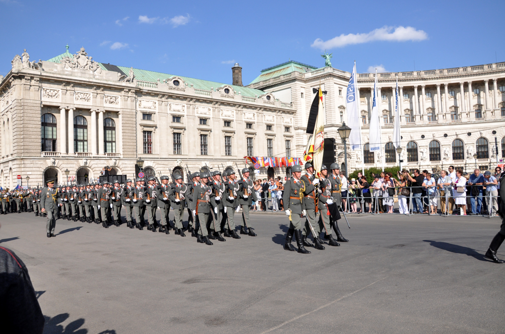 Otto von Habsburg funeral procession